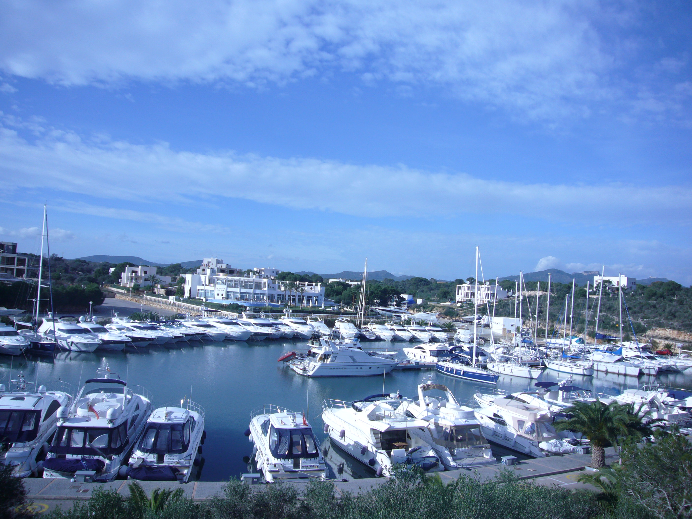 Port Petit de Cala d'Or